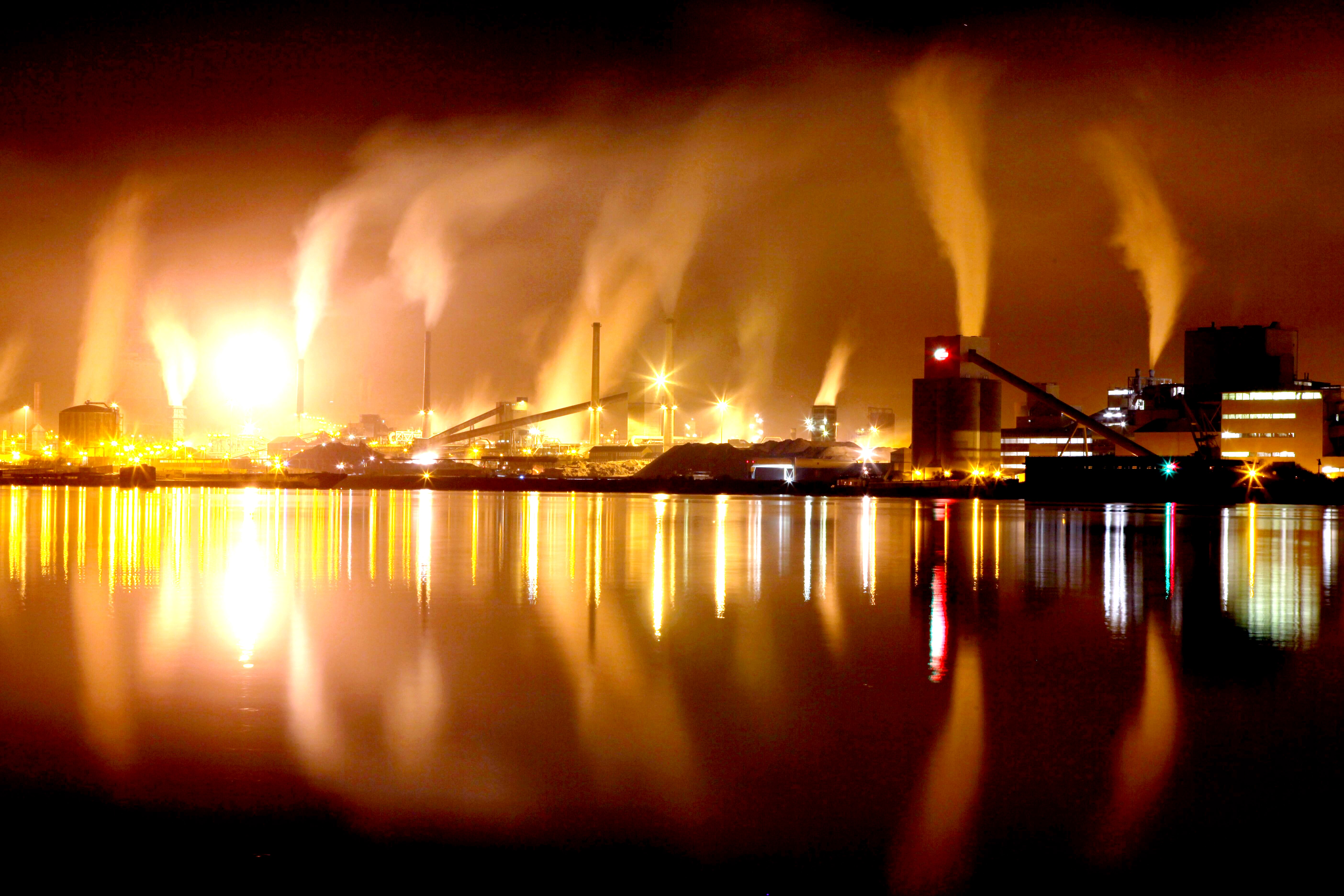 corus / Tata steel IJmuiden velsen beverwijk